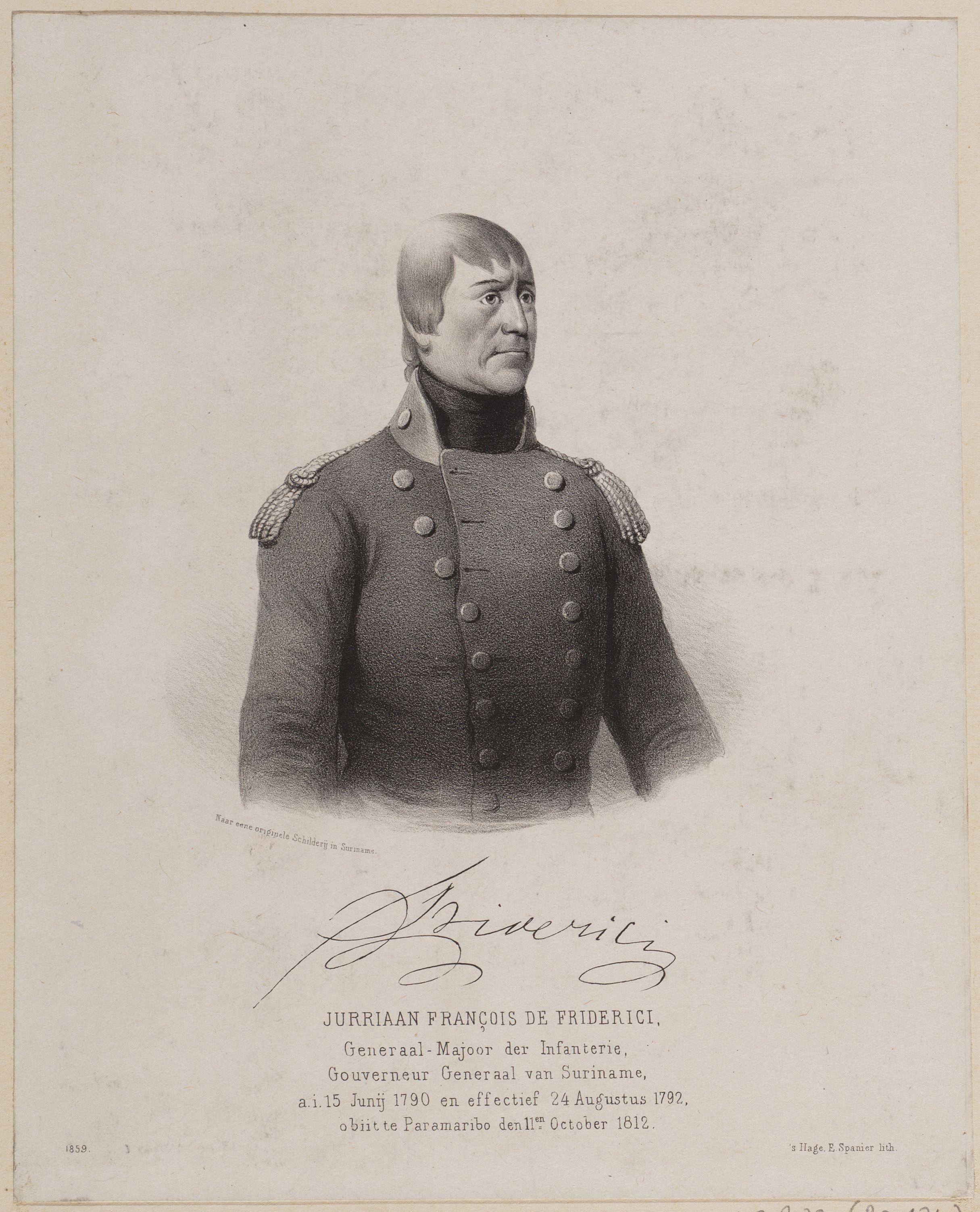 Porträt von Jurriaan de Friderici, von 1792-1802 Generalgouverneur von Suriname (Lithografie)